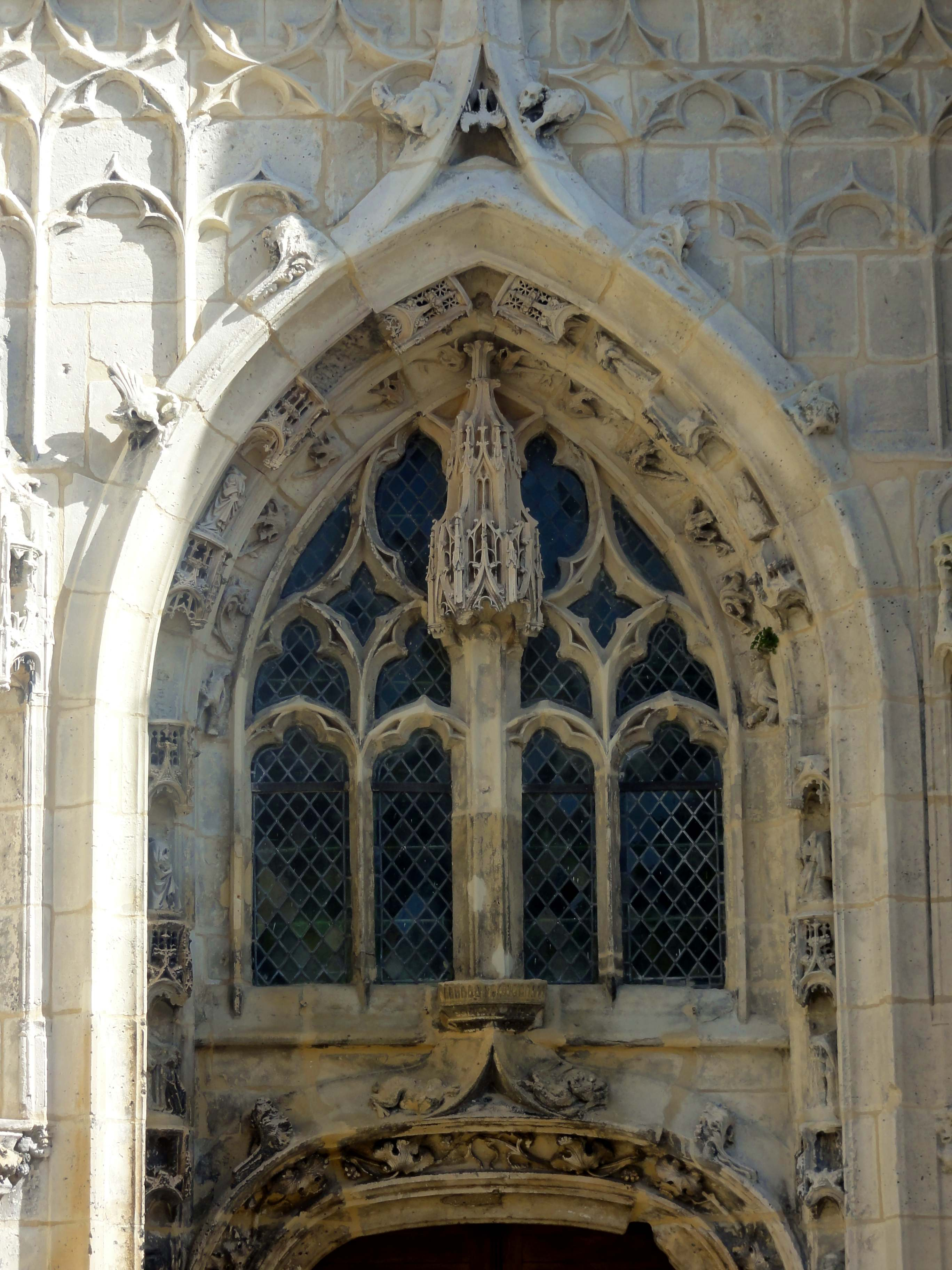 Église Saint-Pierre de Senlis - voir le titre du fichier.